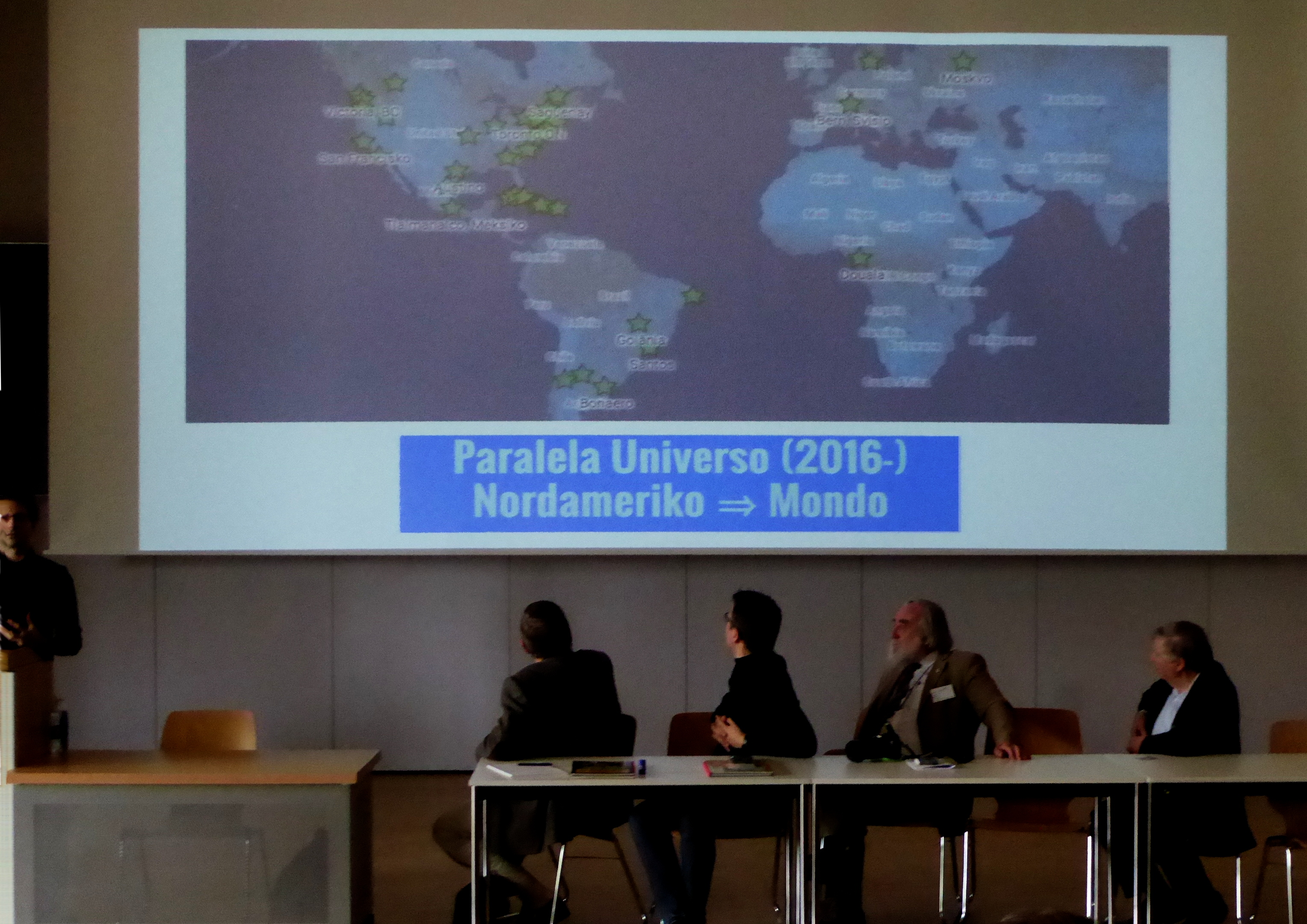 Beim Drei-Länder-Esperanto-Kongress in Zweibrücken im Mai 2018 trägt Chuck Smith über die Veranstaltungen unter dem Motto Paralela Universo vor.